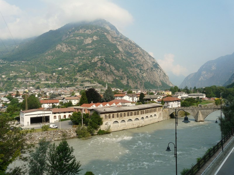 Vista del comune di Hône dal forte di Bard, Valle d'Aosta, Italia